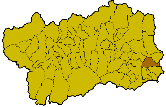 Locatie Issime